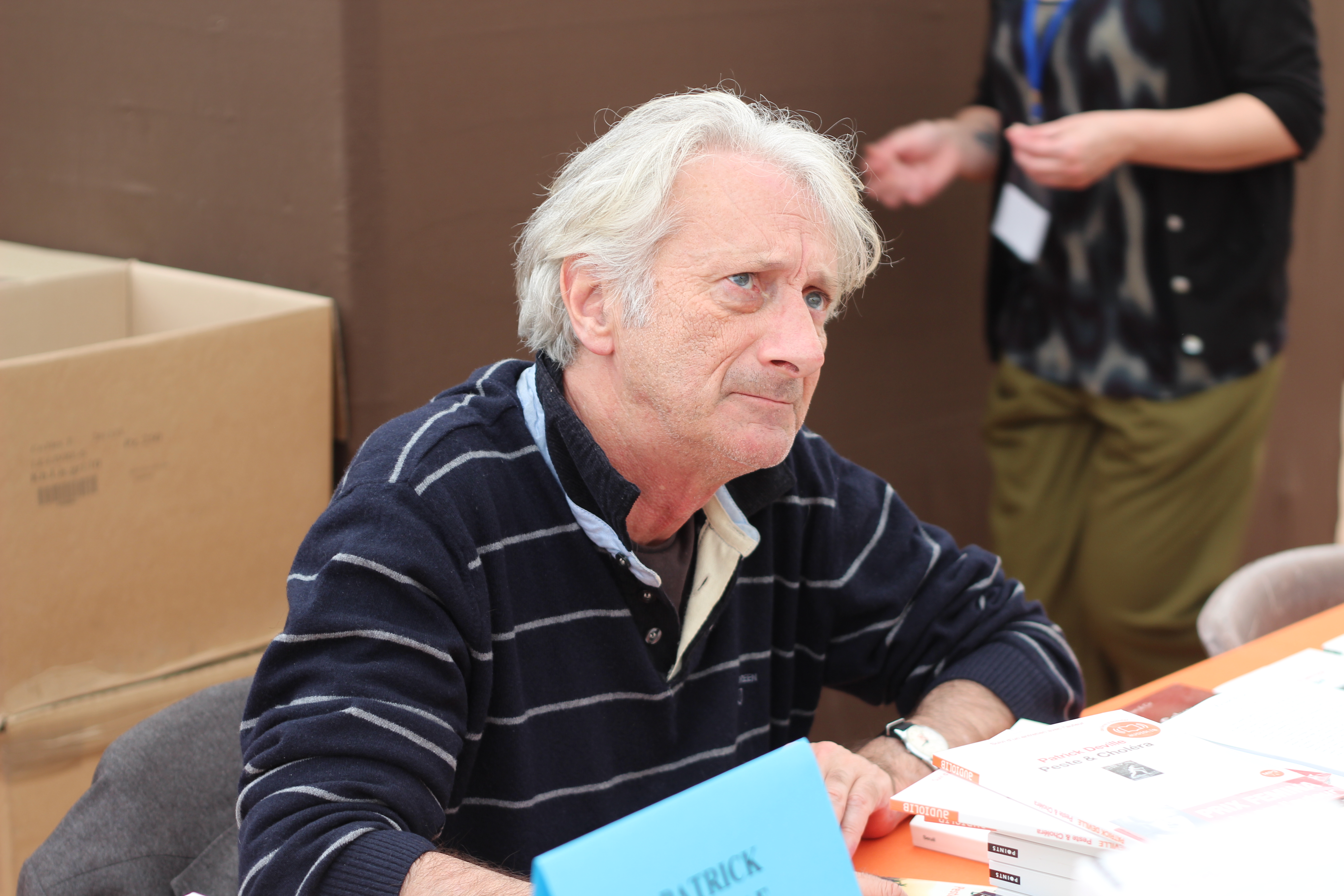 Patrick Delville - Livre sur la Place 2014